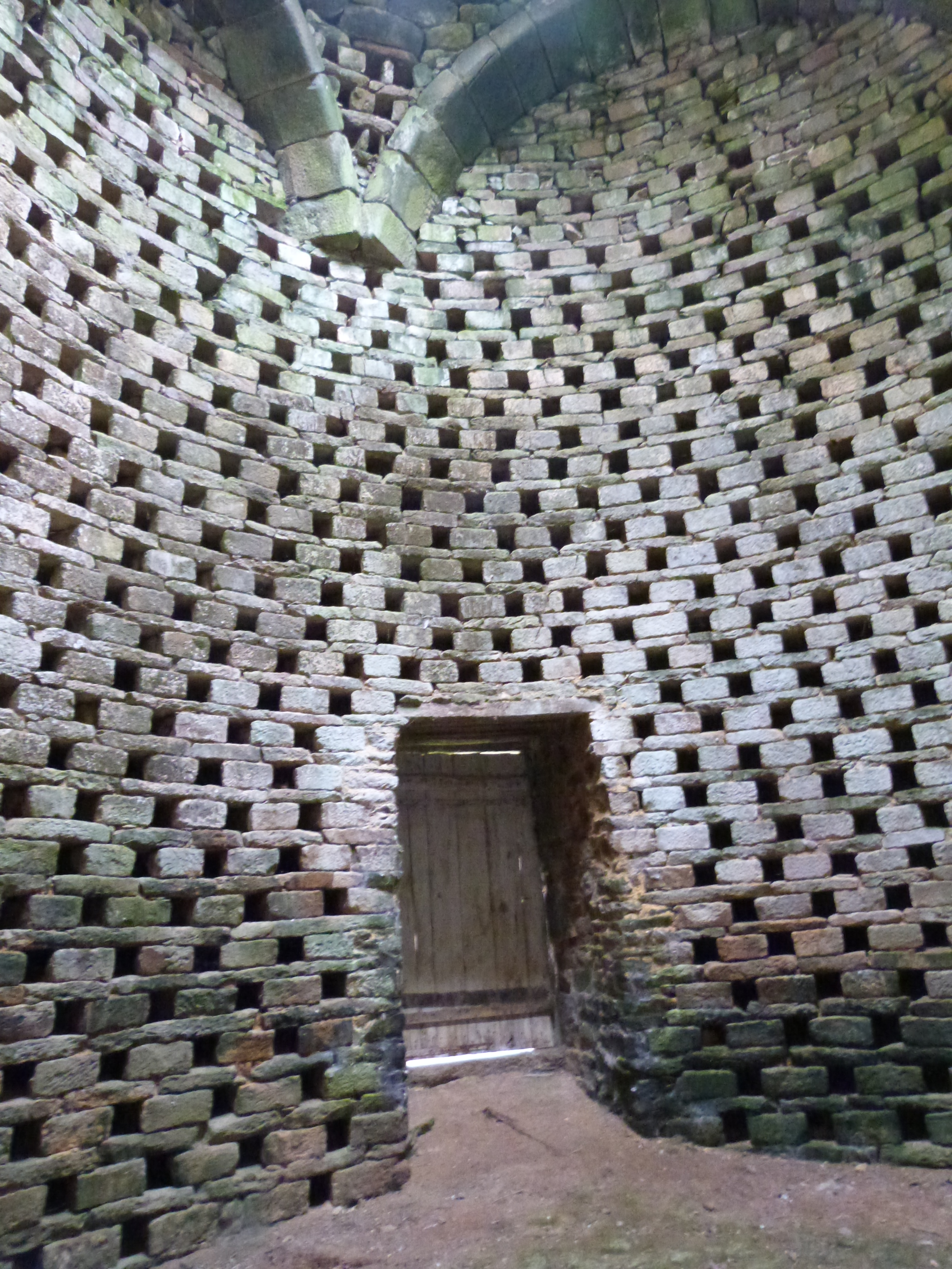 Boulins à l'intérieur du pigeonnier du château de la Houssaye